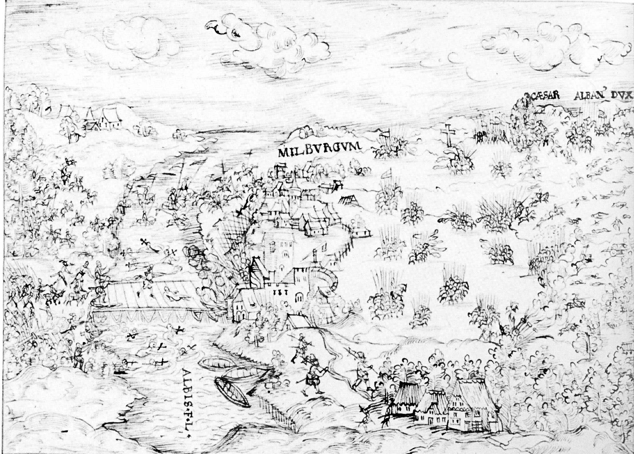 Der Brückenschlag bei Mühlberg aus: De bello Smalcaldico Papierhandschrift, Federzeichnung